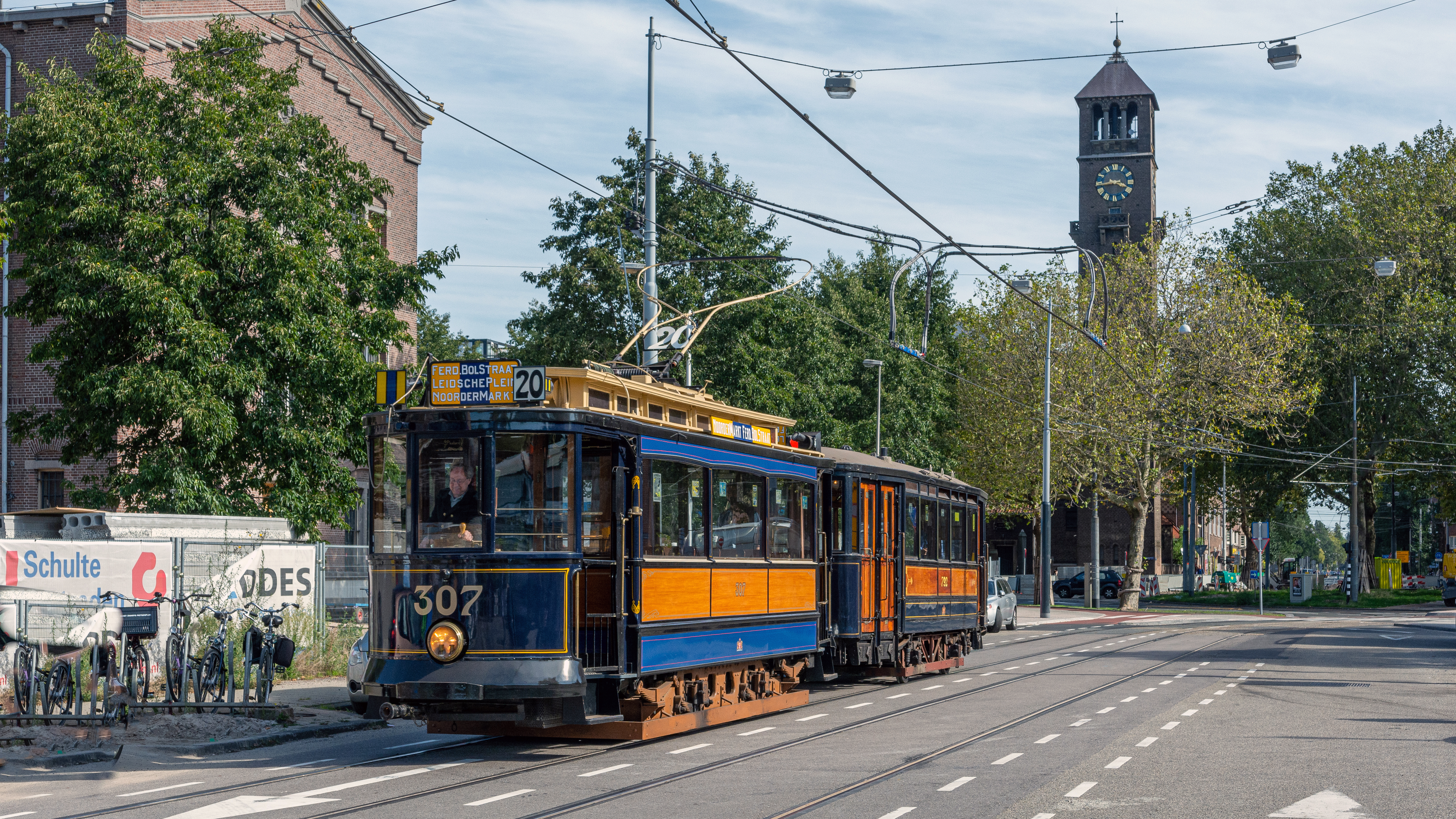 Museumtram 307 met bijwagen 792 komen terug bij het Haarlemmermeerstation na een rondje stad, waarbij de VU werd aangedaan.